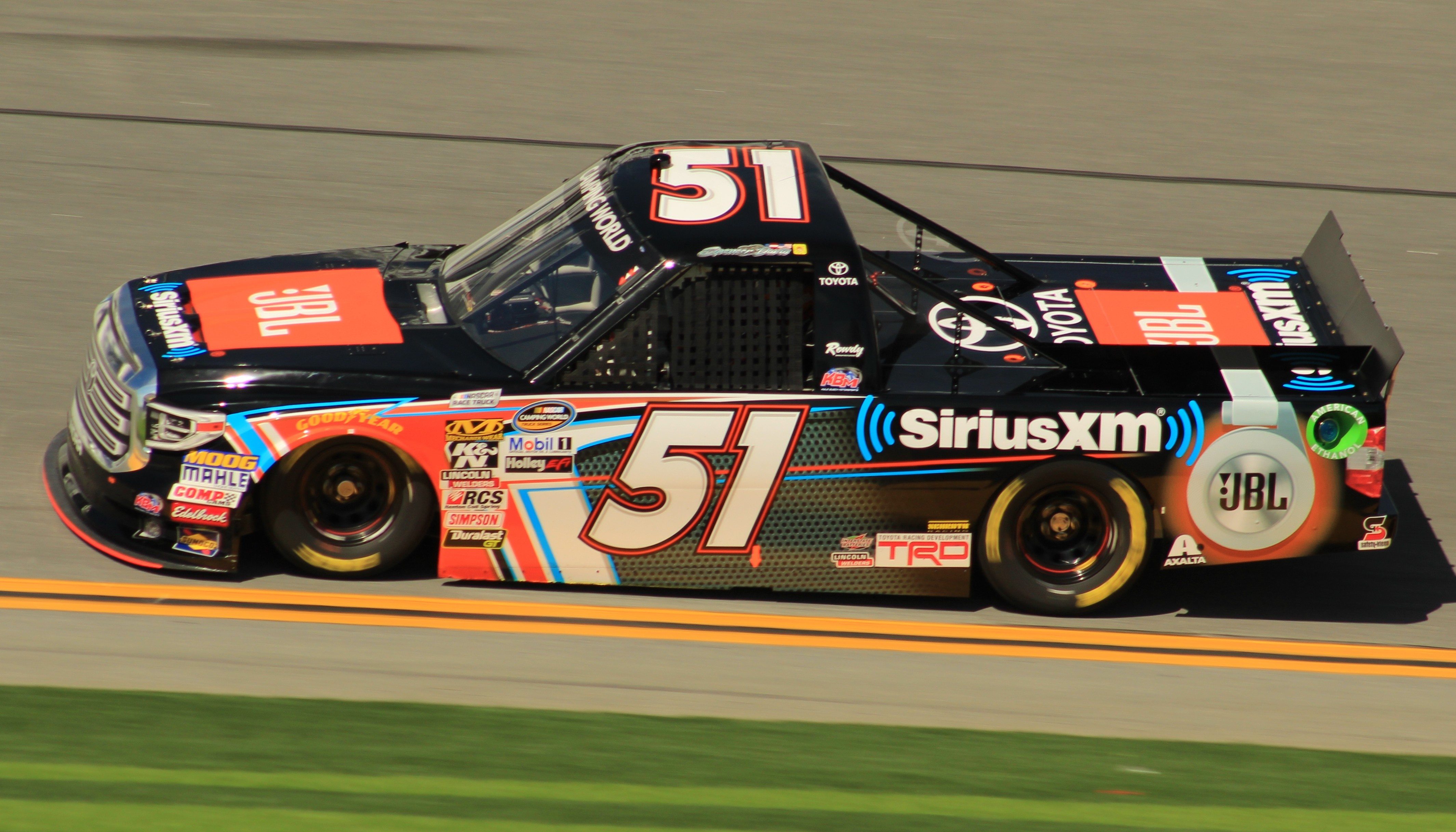 2018 Daytona 500